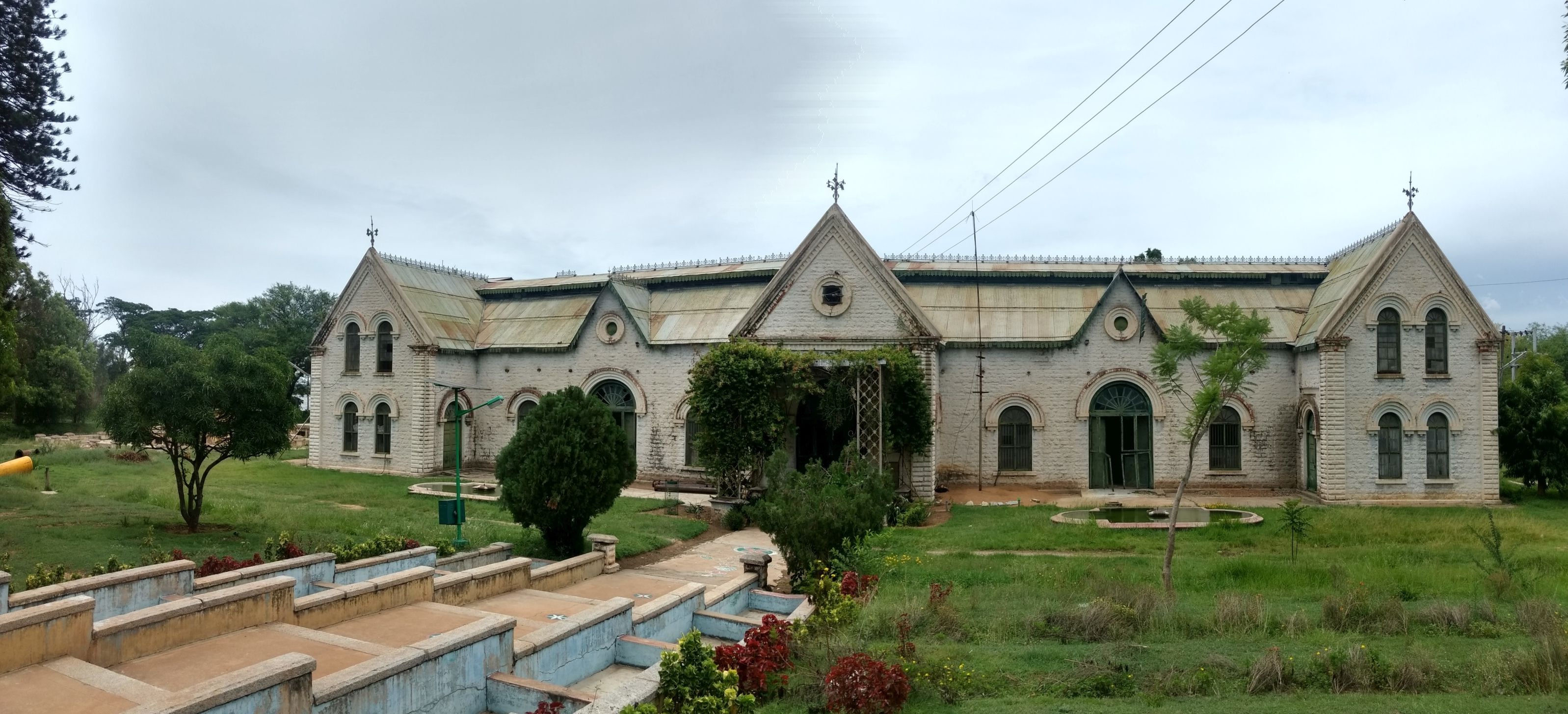 Bethamangala water works, Kolar, India